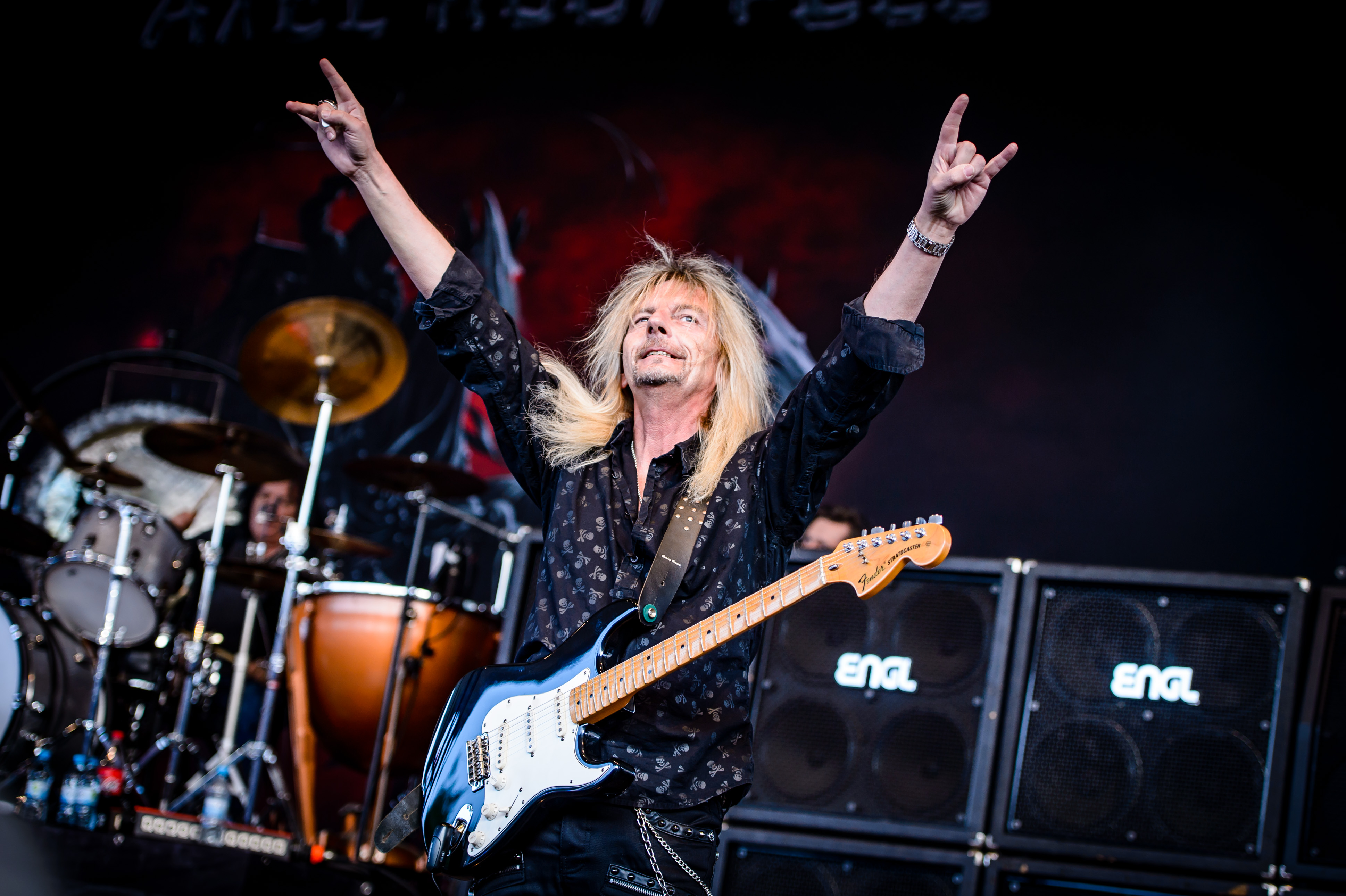 'Rock Hard Festival 2018; Amphitheater Gelsenkirchen': 'Axel Rudi Pell'